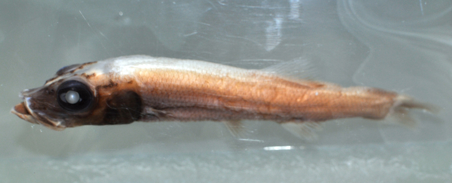 Alepocephalus sp.